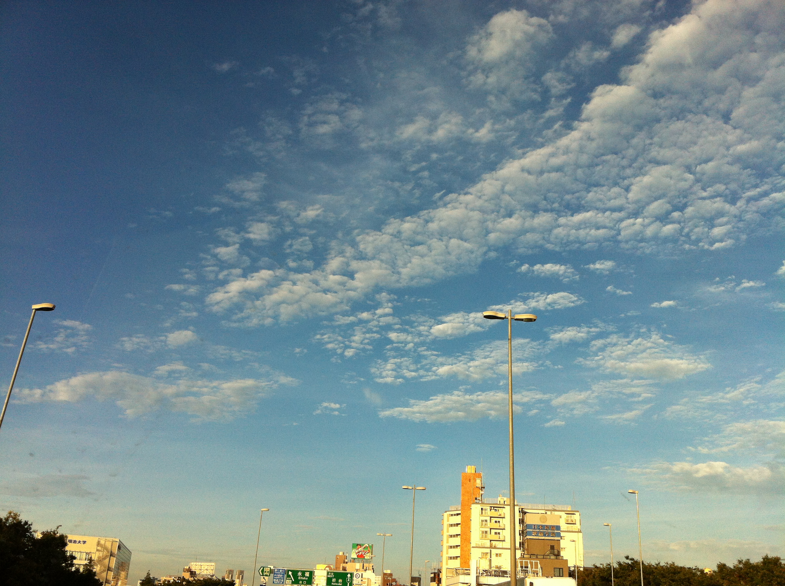 1 Chome Eifuku, Suginami-ku, Tōkyō-to 168-0064, Japan